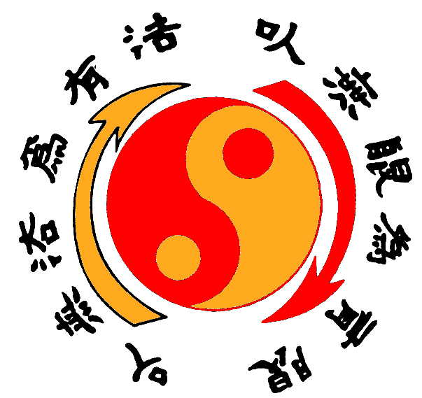 taijitu JKD